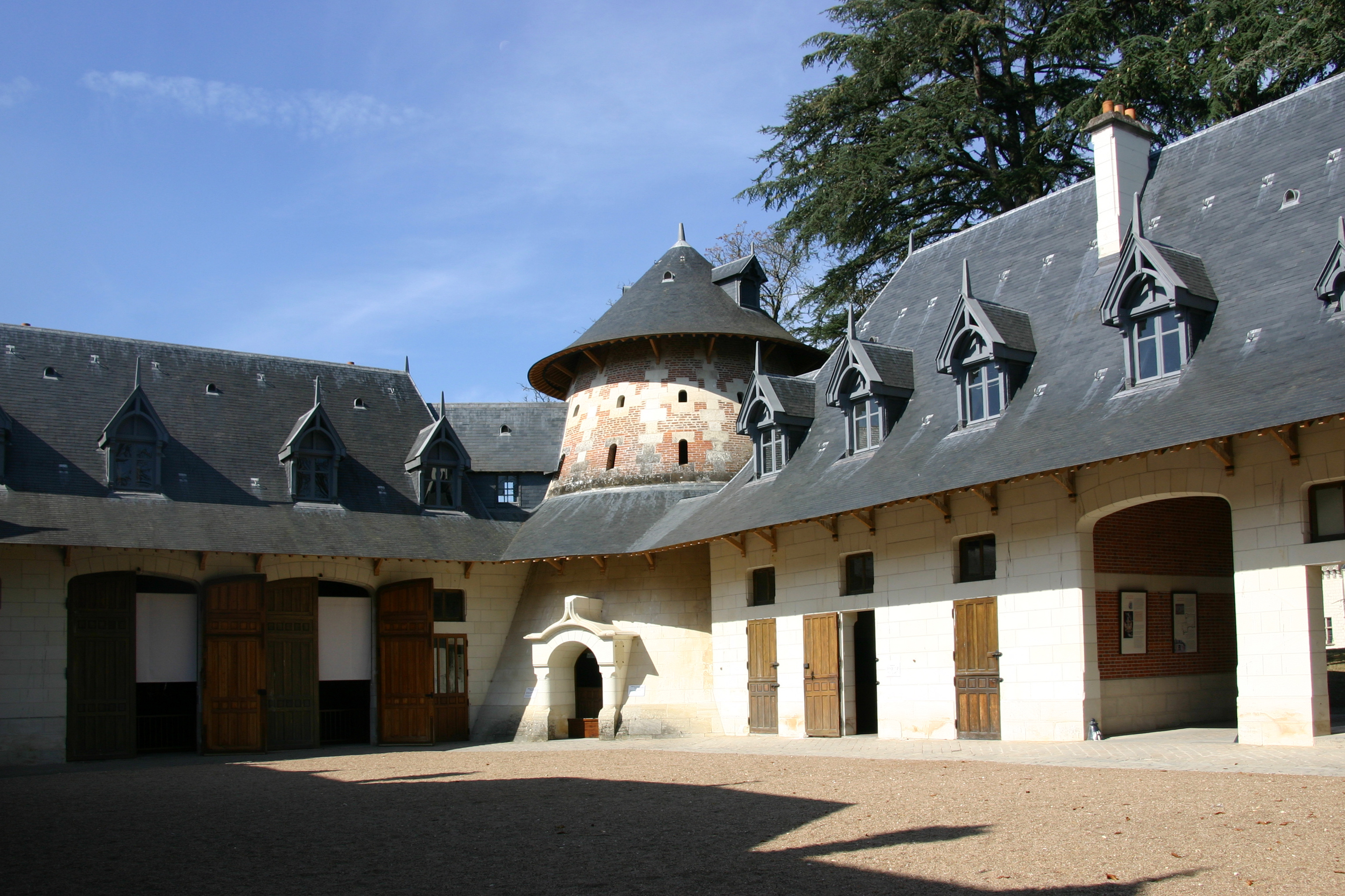 Château de Chaumont-sur-Loire